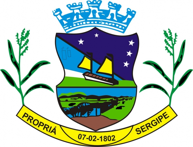 Brasão município de Propriá, Sergipe